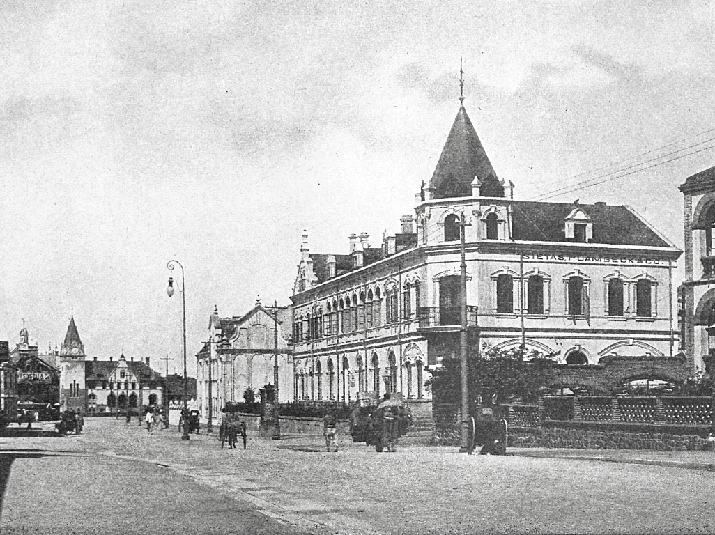 青岛兰山路（原霍亨索伦街）哈利洋行